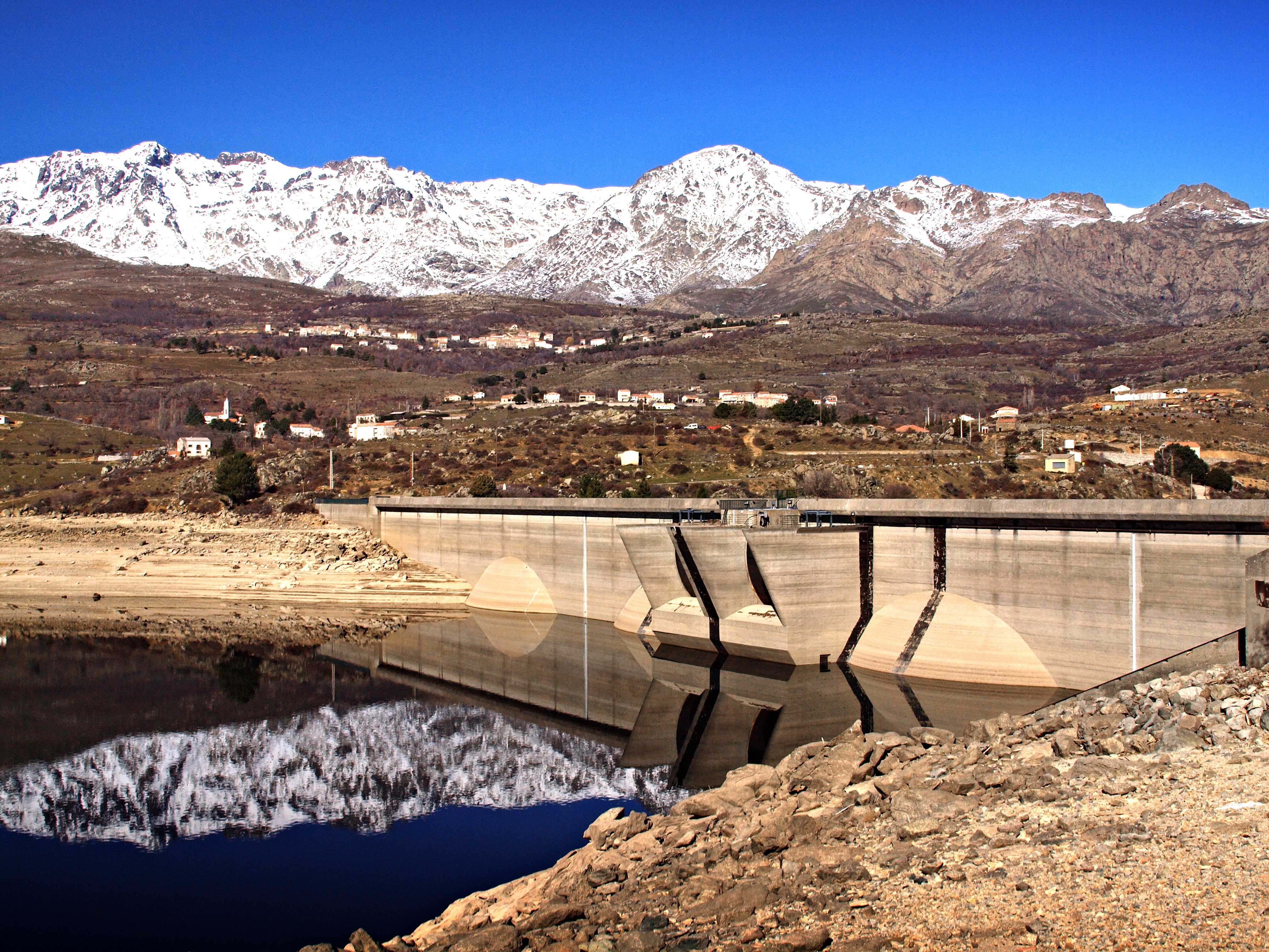 Calacuccia (Corse) - Le barrage sur le Golo. À l'arrière, Lozzi. À gauche, Monte Cinto (2706 m)